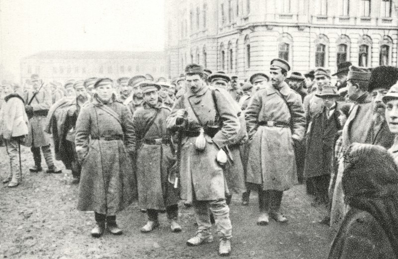 Jeńcy rosyjscy na rynku w Nowym Sączu.